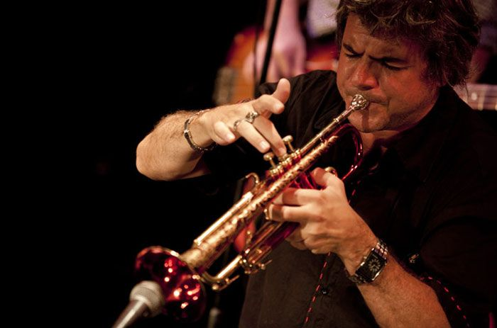 Miguel Ángel Tallarita.